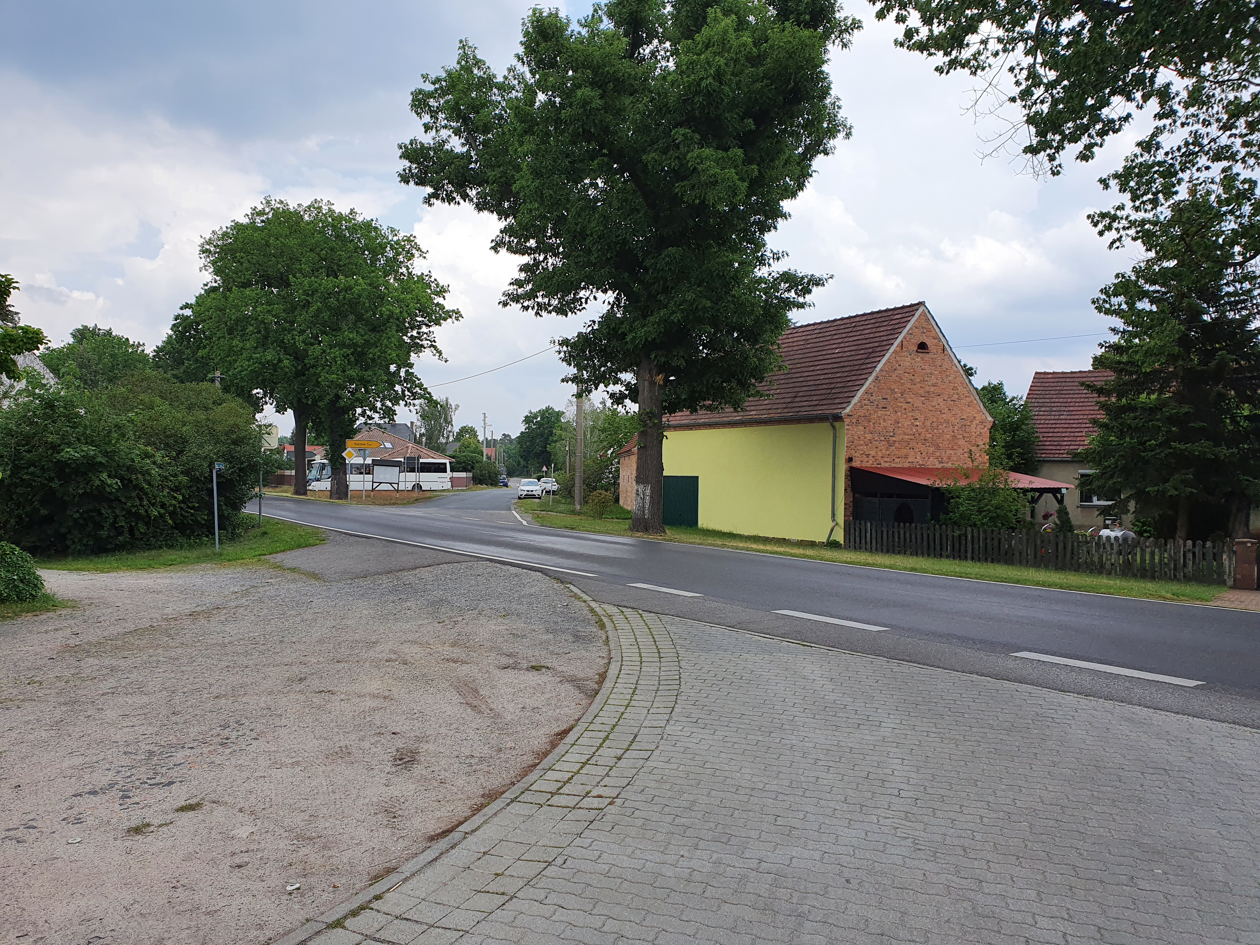 Blick aus der Muckwarer Dorfstraße auf die Landesstraße 53 (Calauer Straße); die zentrale Kreuzung des Ortes.